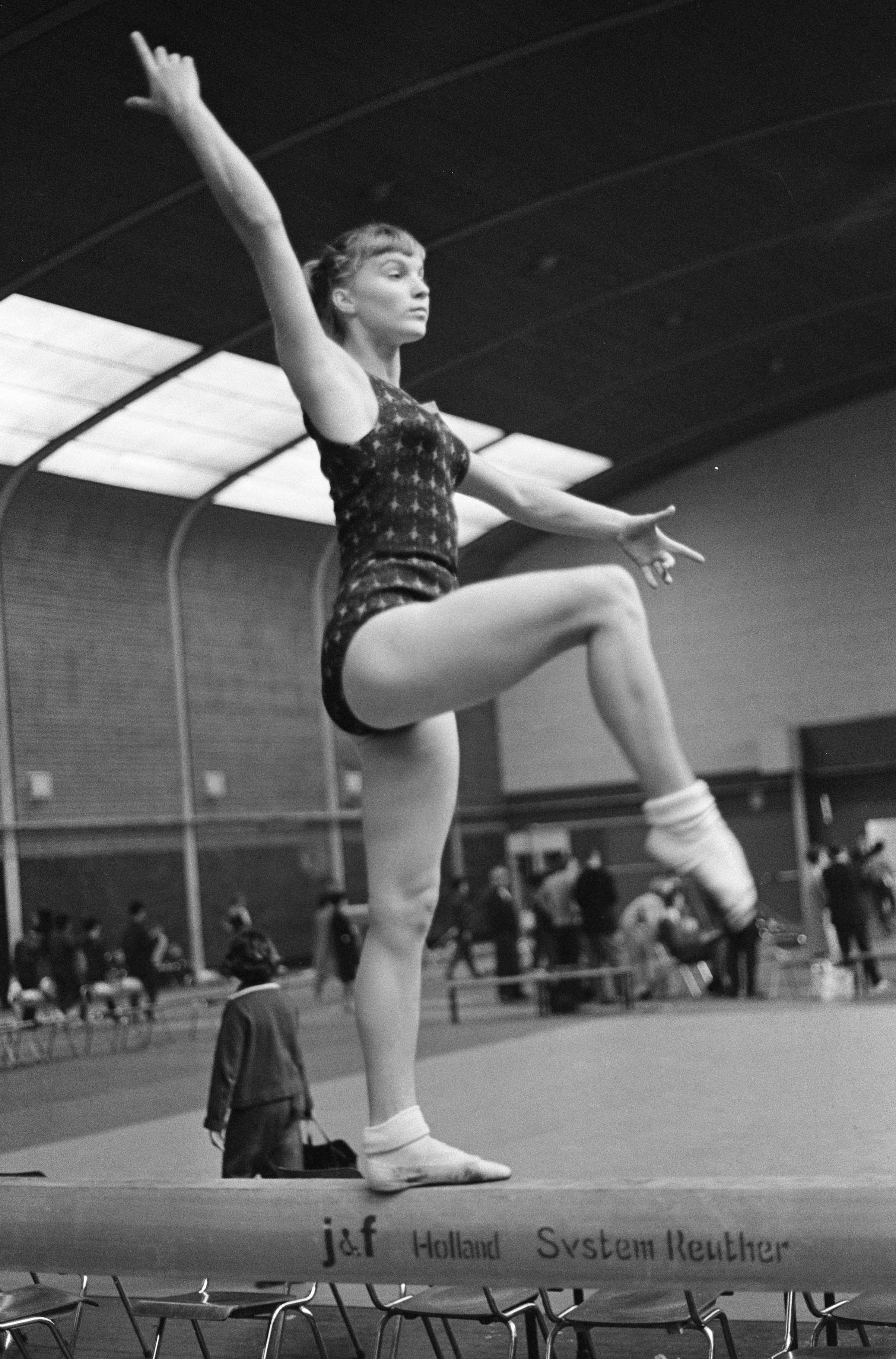 Collectie / Archief : Fotocollectie Anefo Reportage / Serie : Wereldkampioenschappen turnen 1966 in Dortmunt Beschrijving : Russische turnster Larisa Petrick in aktie op de evenwichtsbalk Datum : 21 september 1966 Locatie : Dortmund, Duitsland Trefwoorden : sport, sportmanifestaties, turnen Persoonsnaam : Petrick, Larisa Fotograaf : Ron Kroon / Anefo Auteursrechthebbende : Nationaal Archief Materiaalsoort : Negatief (zwart/wit) Nummer archiefinventaris : bekijk toegang 2.24.01.05 Bestanddeelnummer : 919-5843